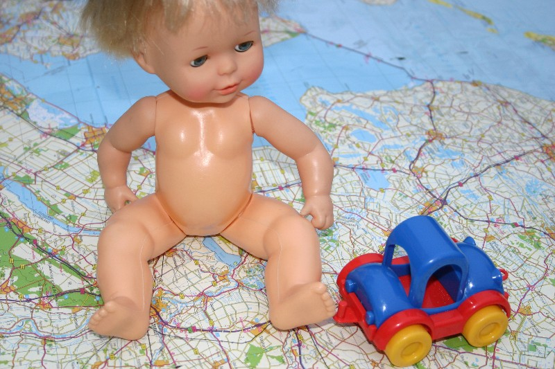 Zelf gemaakte foto van een pop + auto op kaart als uitleg voor dat we per definite naar een gemodelleerde, en niet werkelijke, werkelijkheid kijken